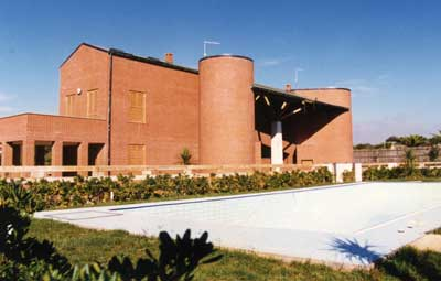 Maison individuelle, Fregene, Rome 1993.